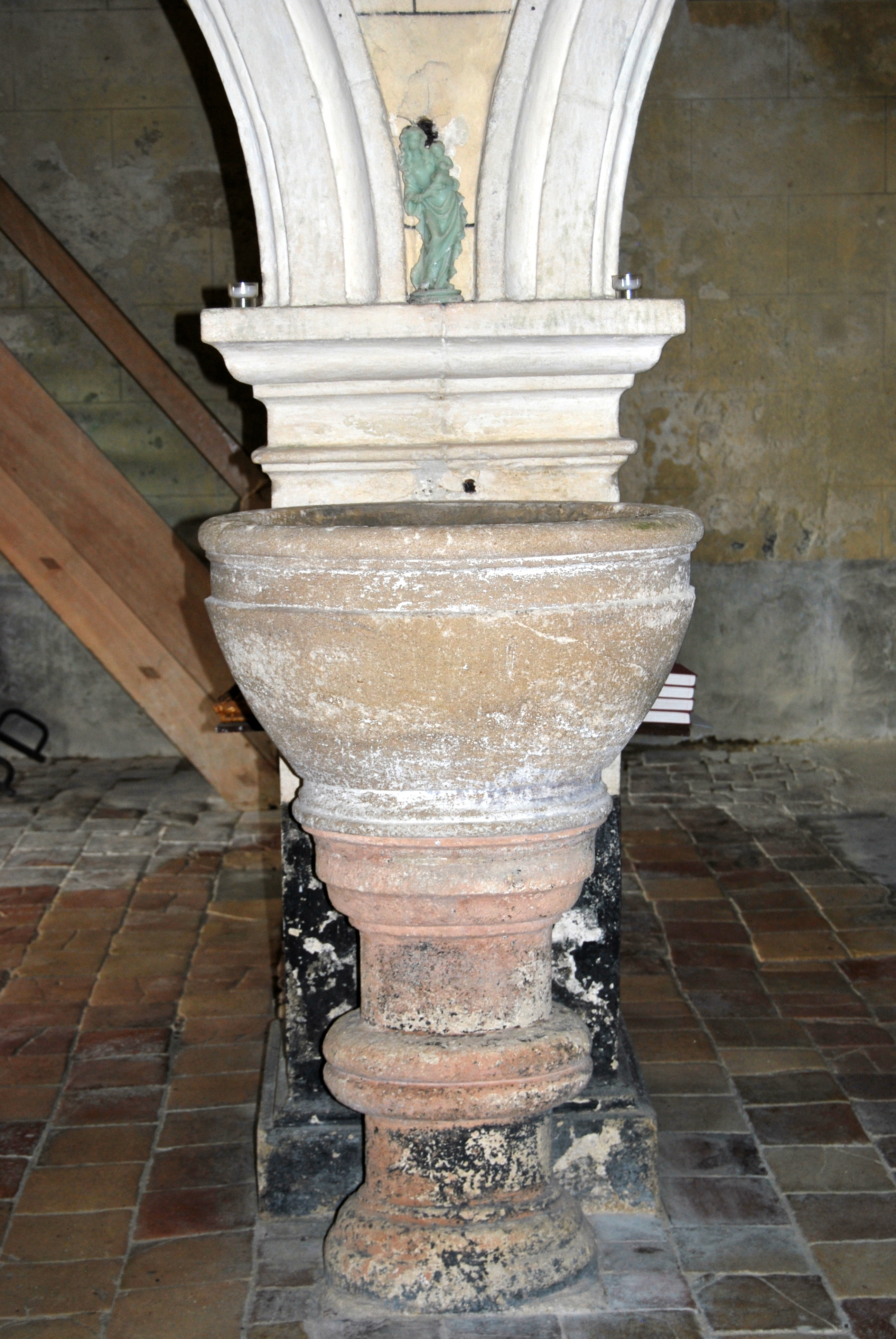 Église Notre-Dame d'Espiet .